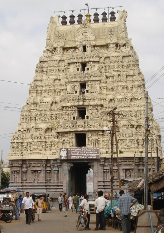 Kanchipuram.in Kamakshi-Amman Temple